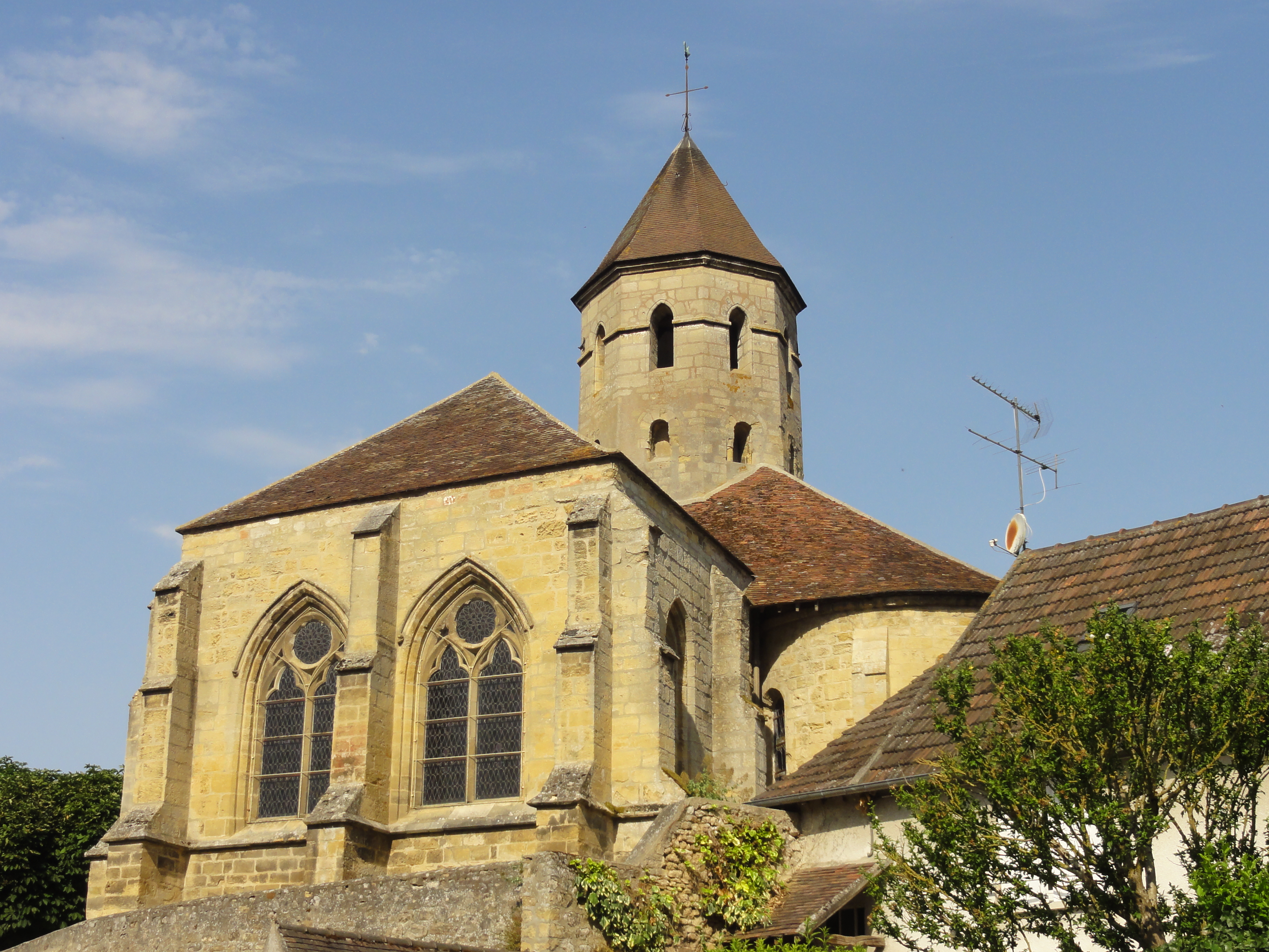 Église Saint-Pierre-ès-Liens de Condécourt (voir titre).